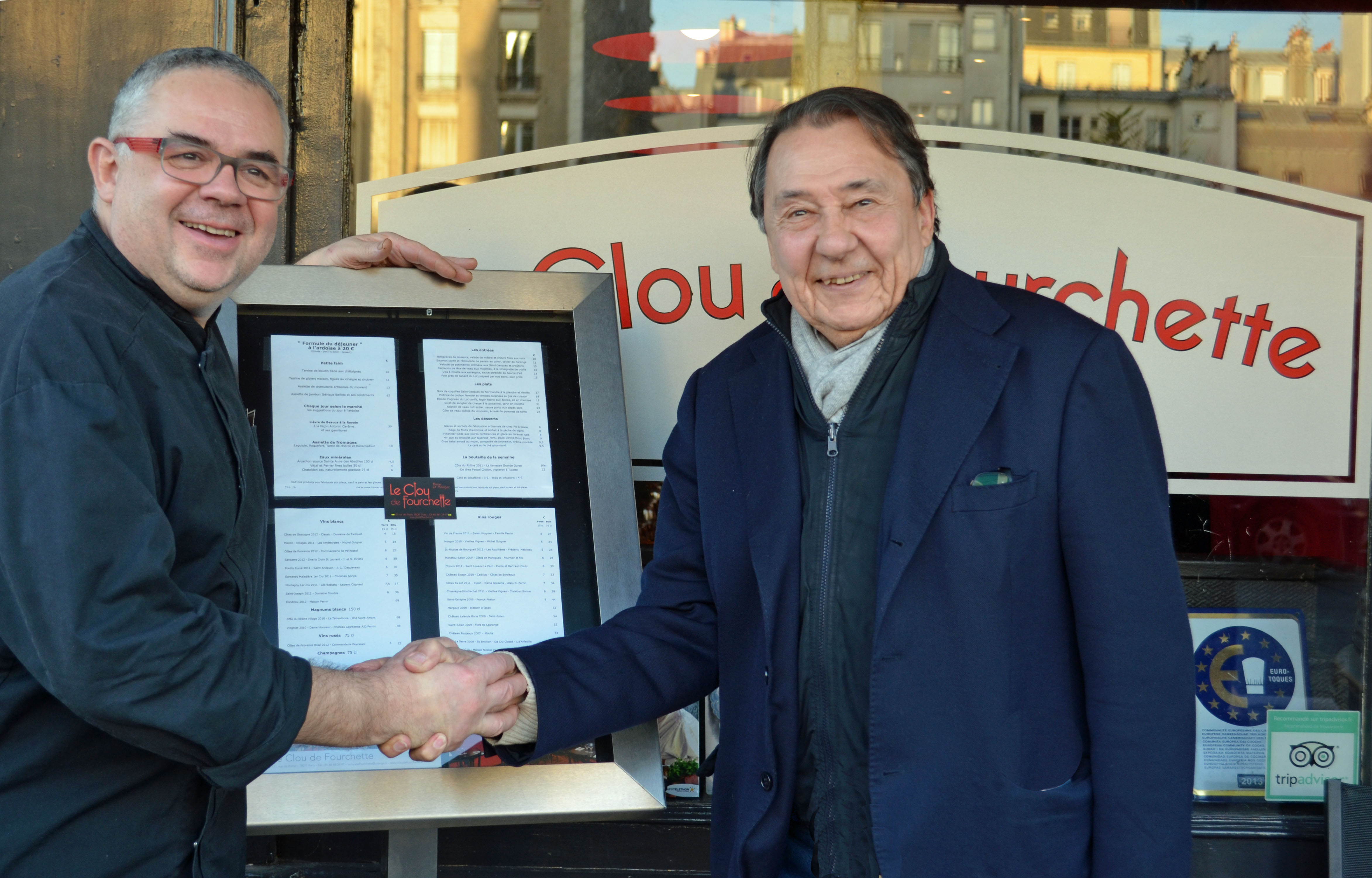 François Roboth et le cuisinier-restaurateur Christian Leclou (Le Clou de Fourchette), à l'issue d'une réunion de dégustation de l'AAAAA, fin 2013.